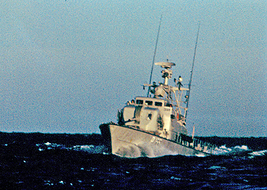 HMS Vale 1979